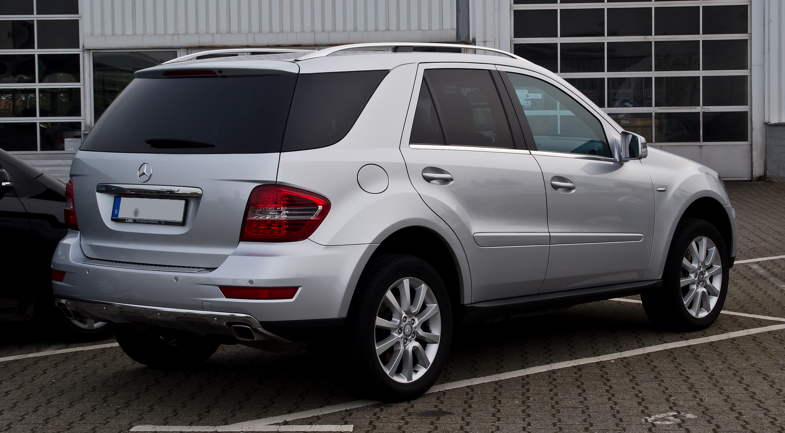 Mercedes-Benz ML 350 CDI 4MATIC Grand Edition (W 164, Facelift)